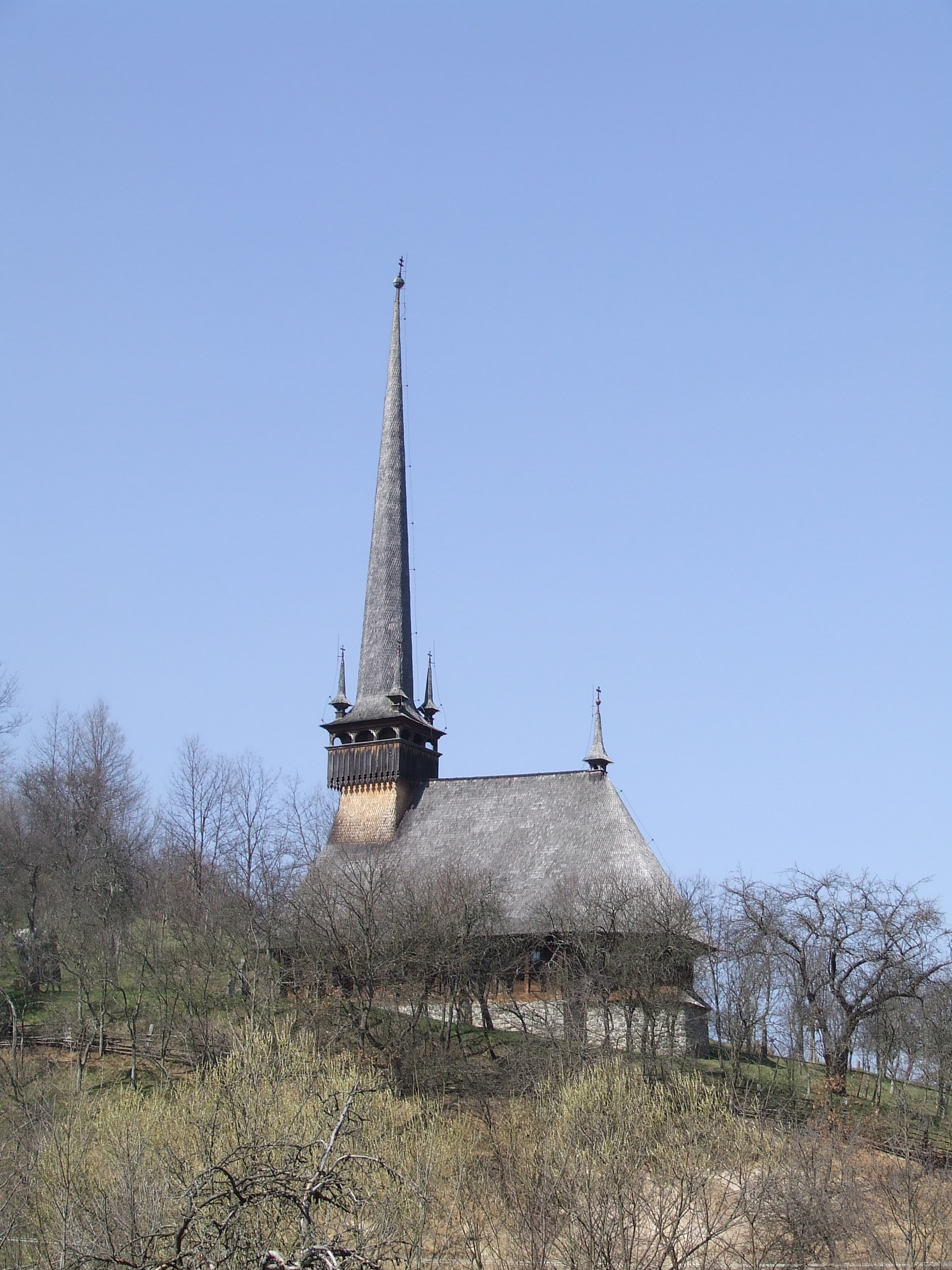 Biserica din Fildu de Sus, Sălaj. Autor: Bogdan Ilieş Data: 31 martie 2007